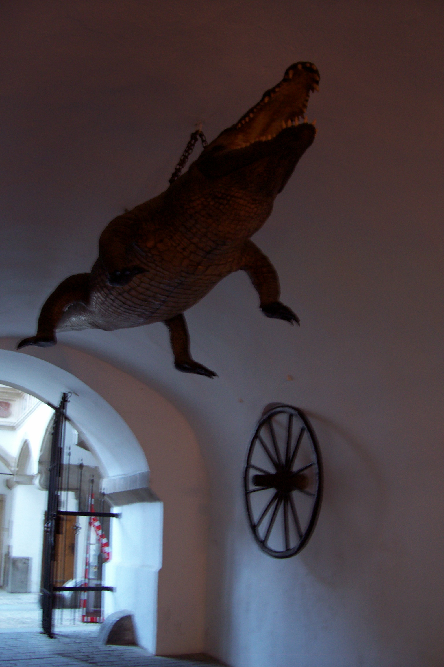 Pověstmi opředené objekty „Brněnské kolo“ a „drak“ v průjezdu brněnské Staré radnice